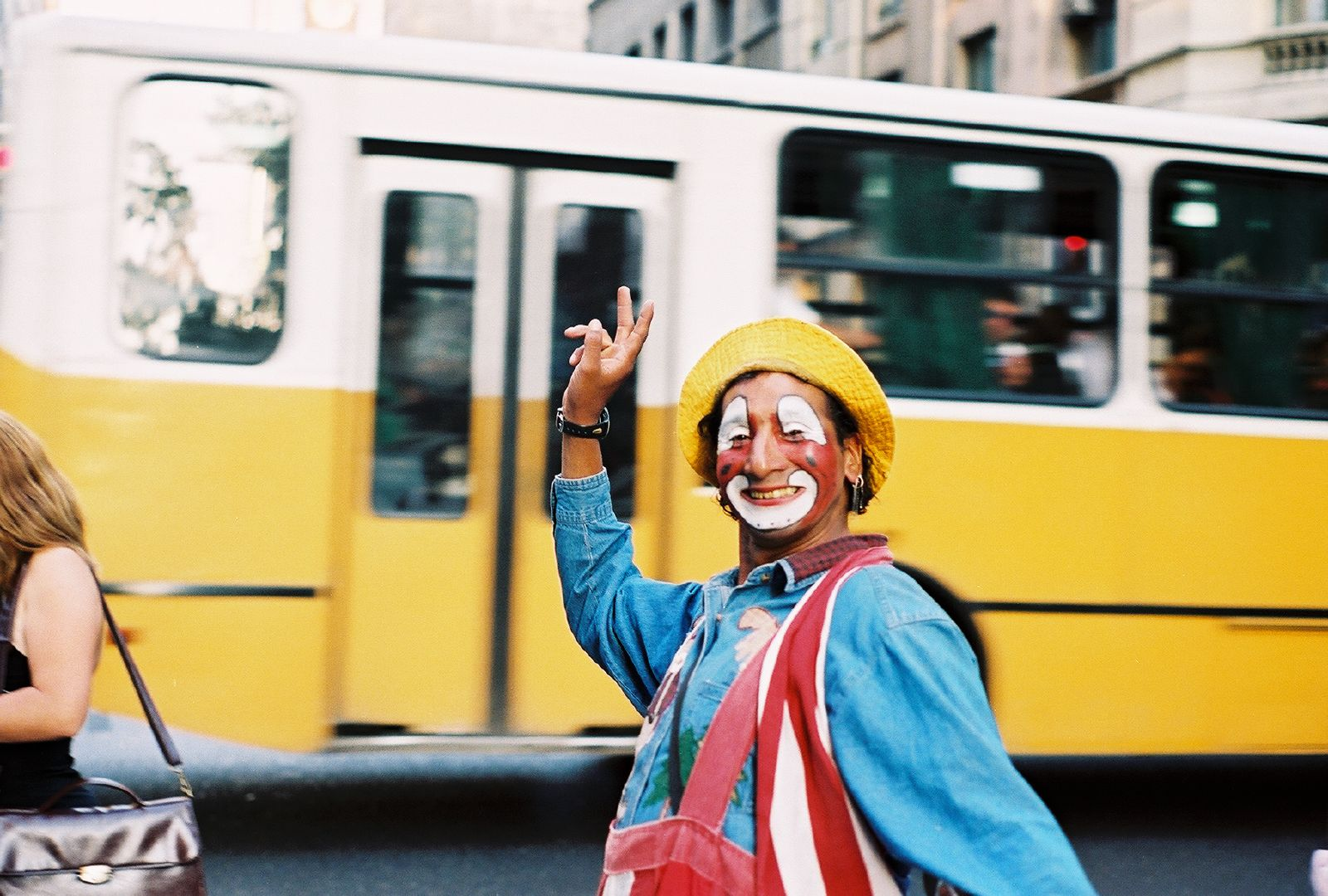 Payaso en Avenida San Antonio, Santiago.